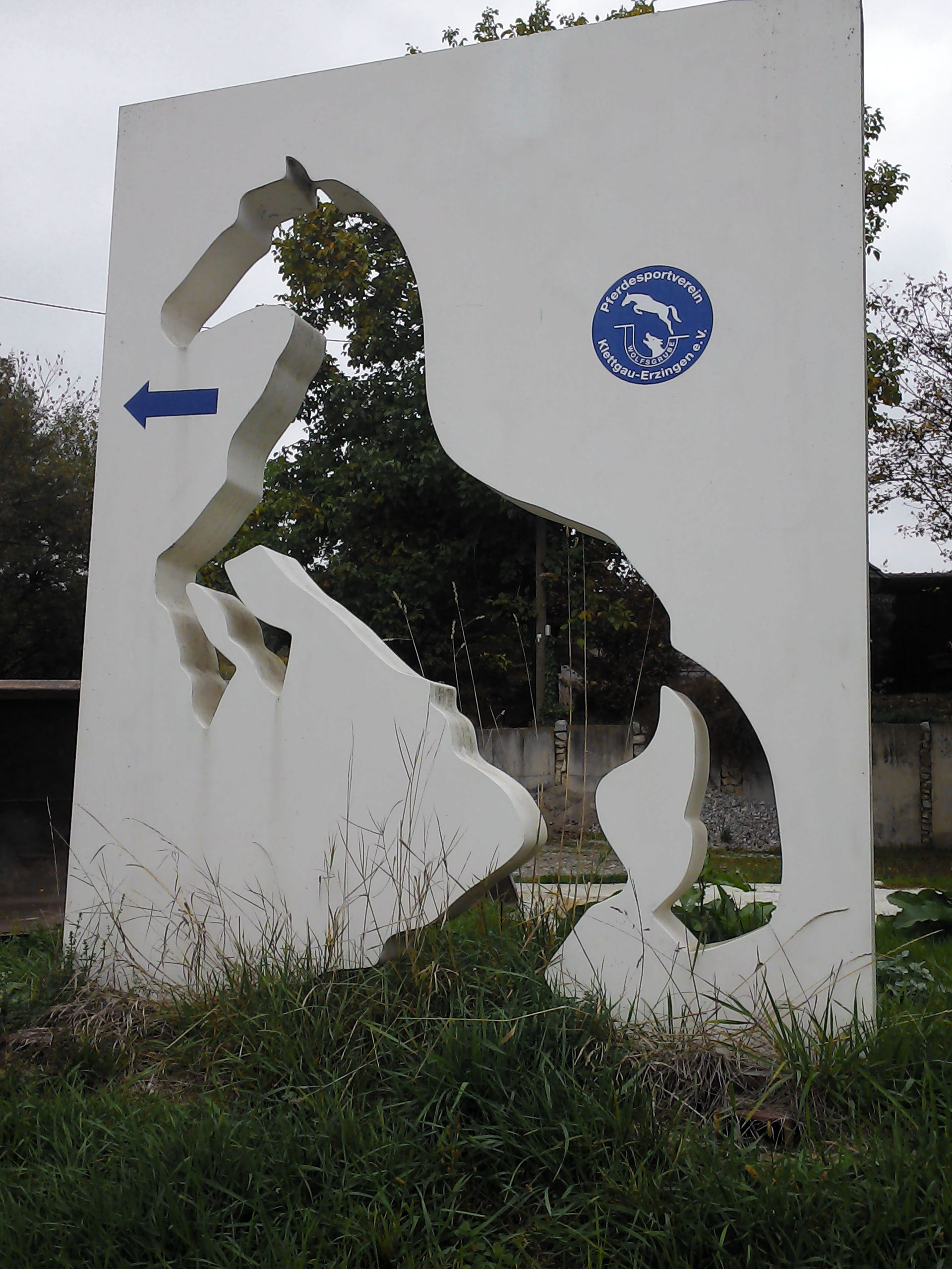 Geschichte der Familie Winter, Erzingen (Klettgau), Gemeinde Klettgau, Landkreis Waldshut, Baden-Württemberg. Franz Winter, Gestüt „Wolfsgrube“.